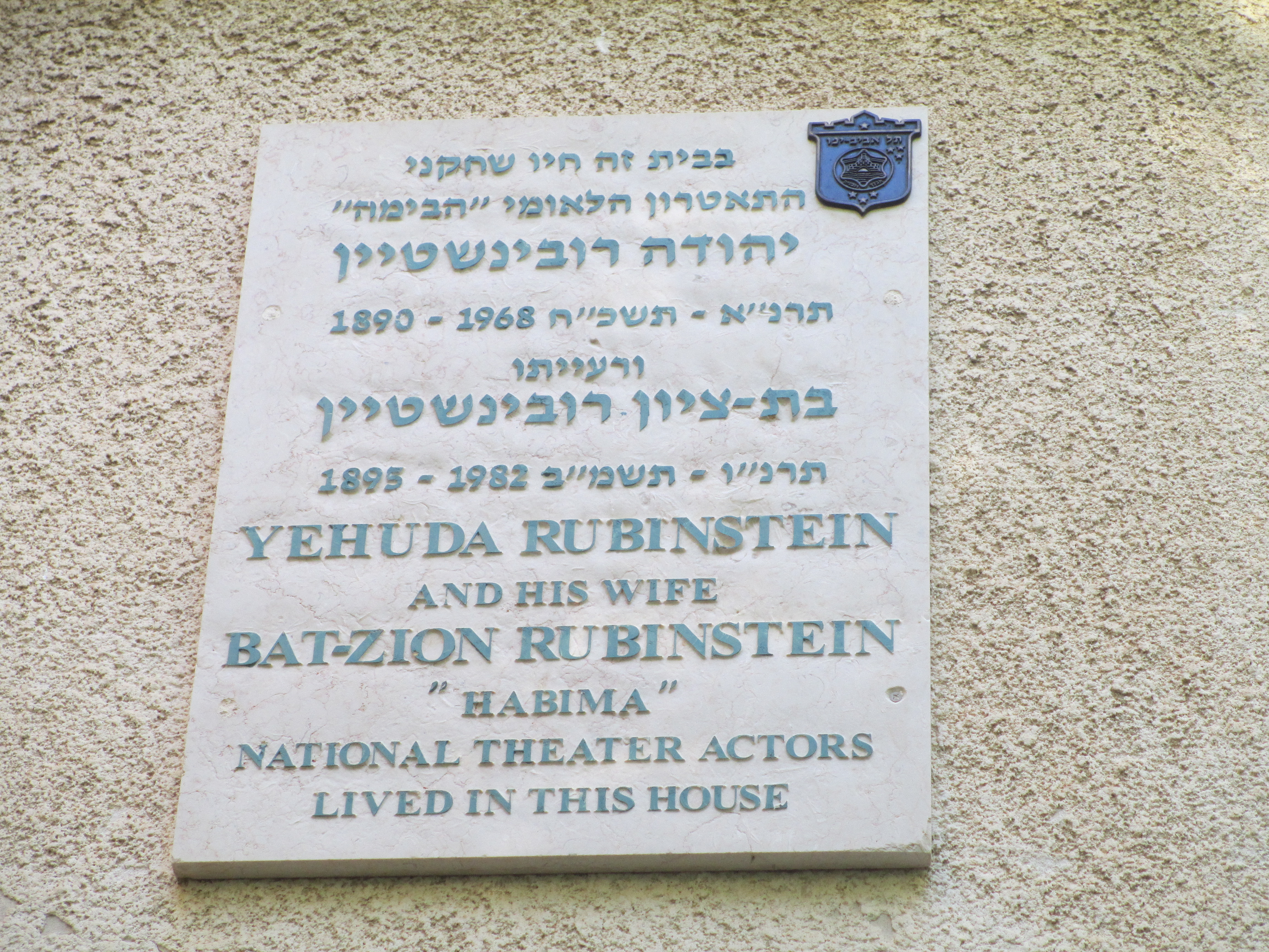 לוחית זיכרון לשחקני הבימה יהודה ובת-ציון רובינשטיין בתל אביב